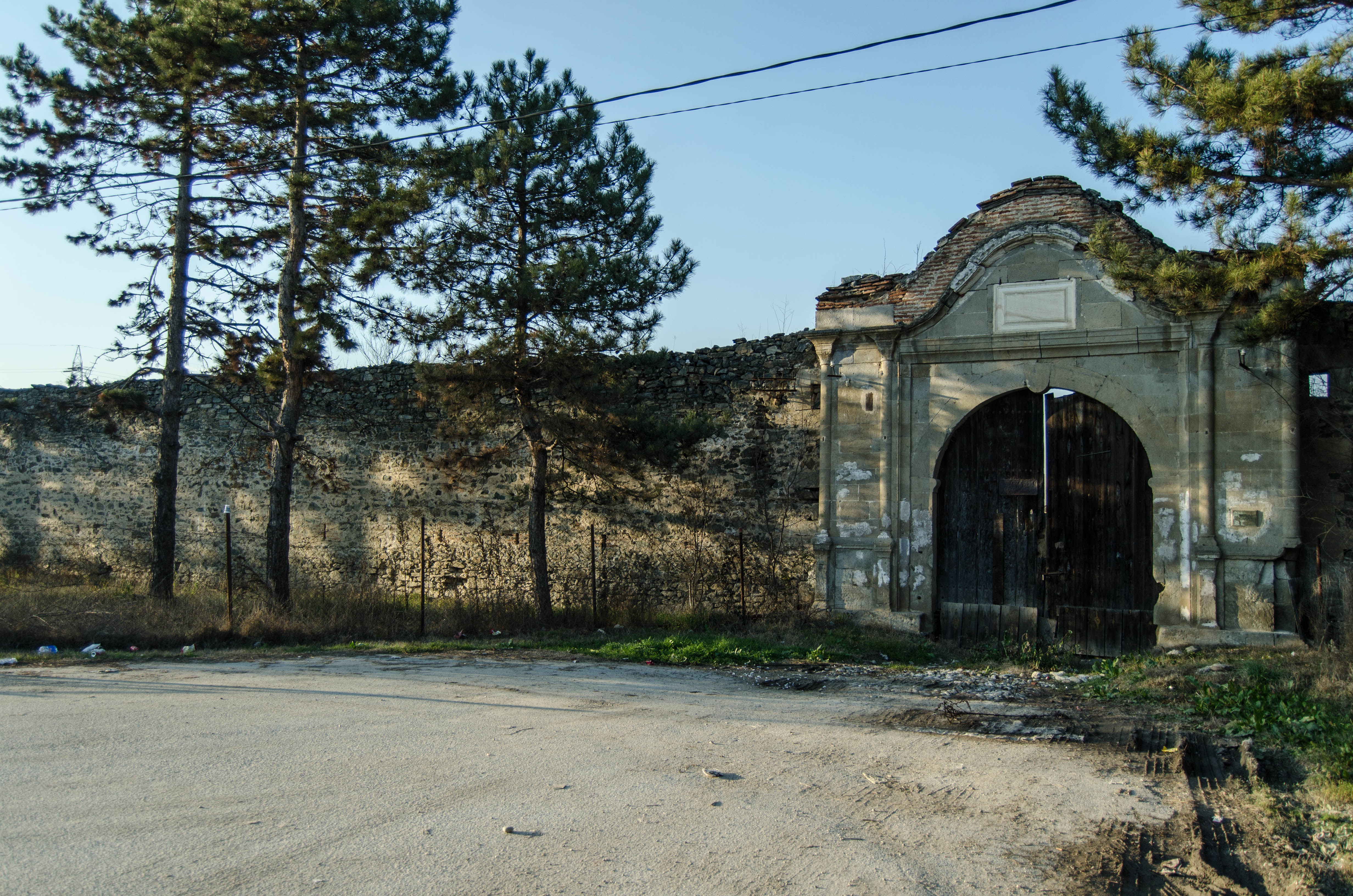 Фотографија од предната страна на Хавзипашини Конаци. Дел од ѕидот со портата